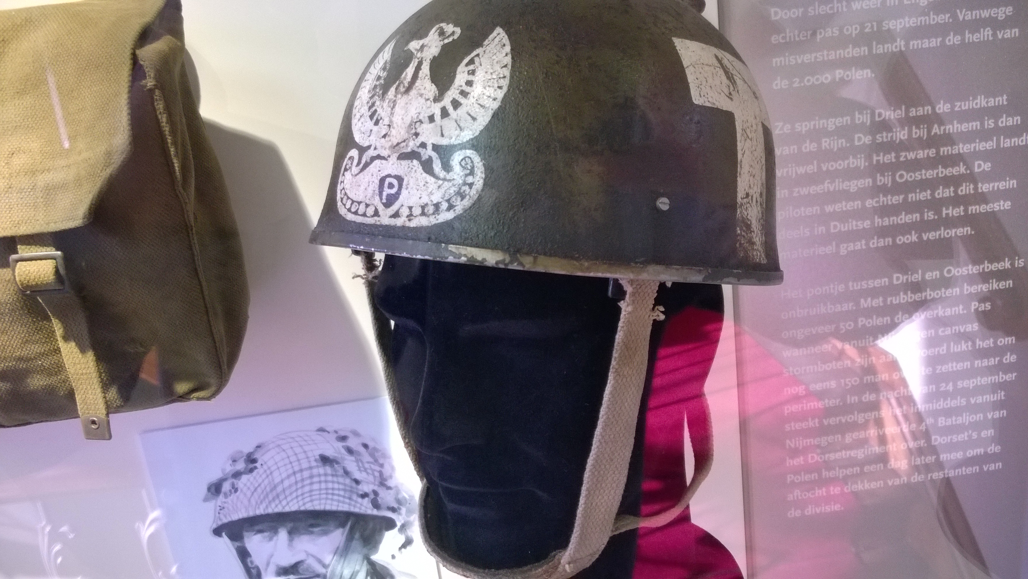 broń długa